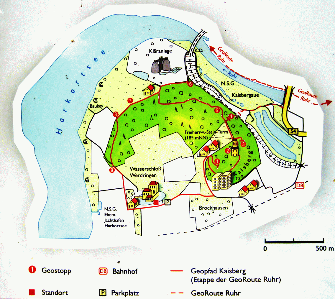 Karte des Geopfads Kaisberg (Panoramafrei) - Google Maps - Google Earth